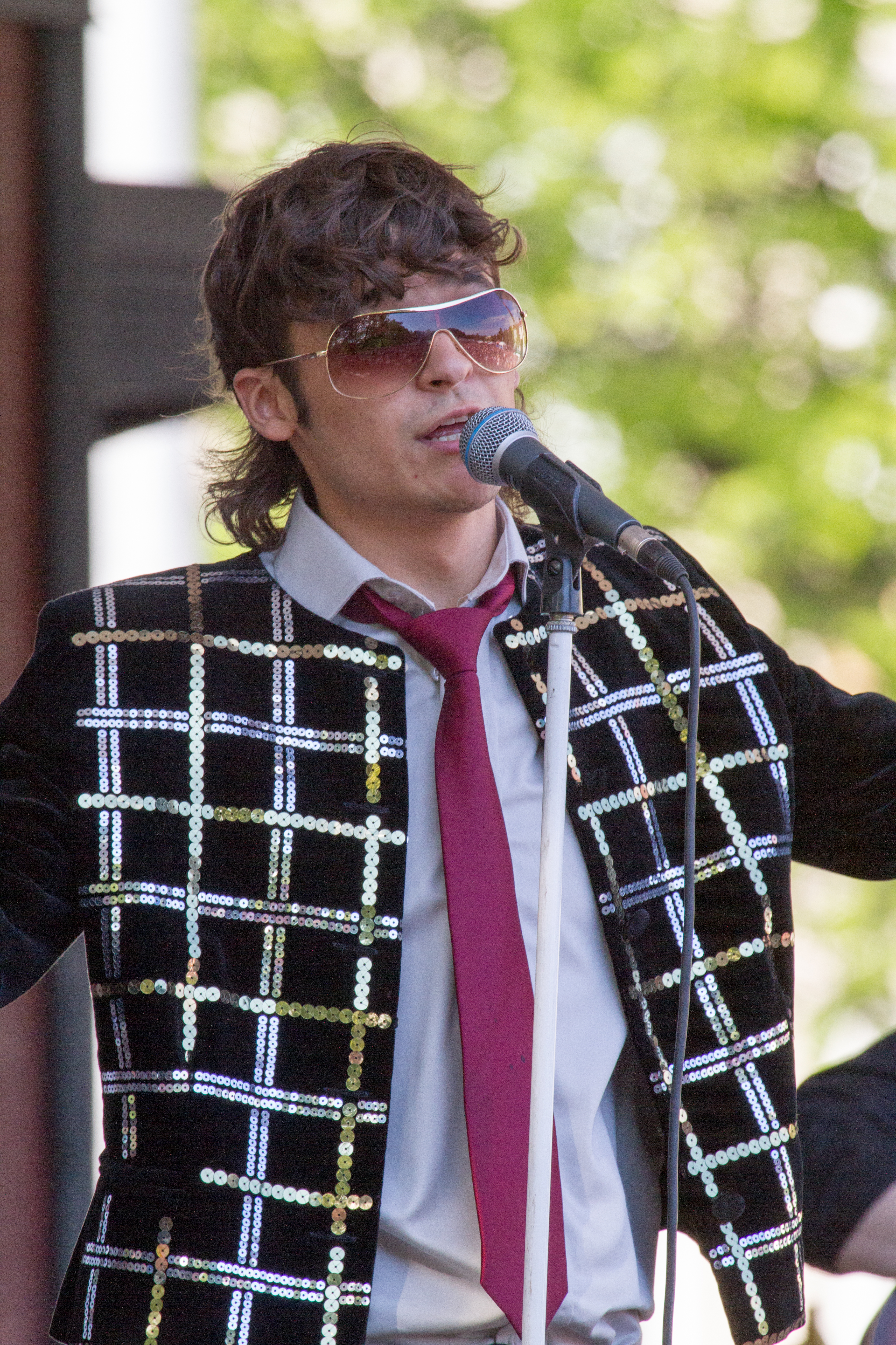 Amadeus Lundberg suomalainen laulaja